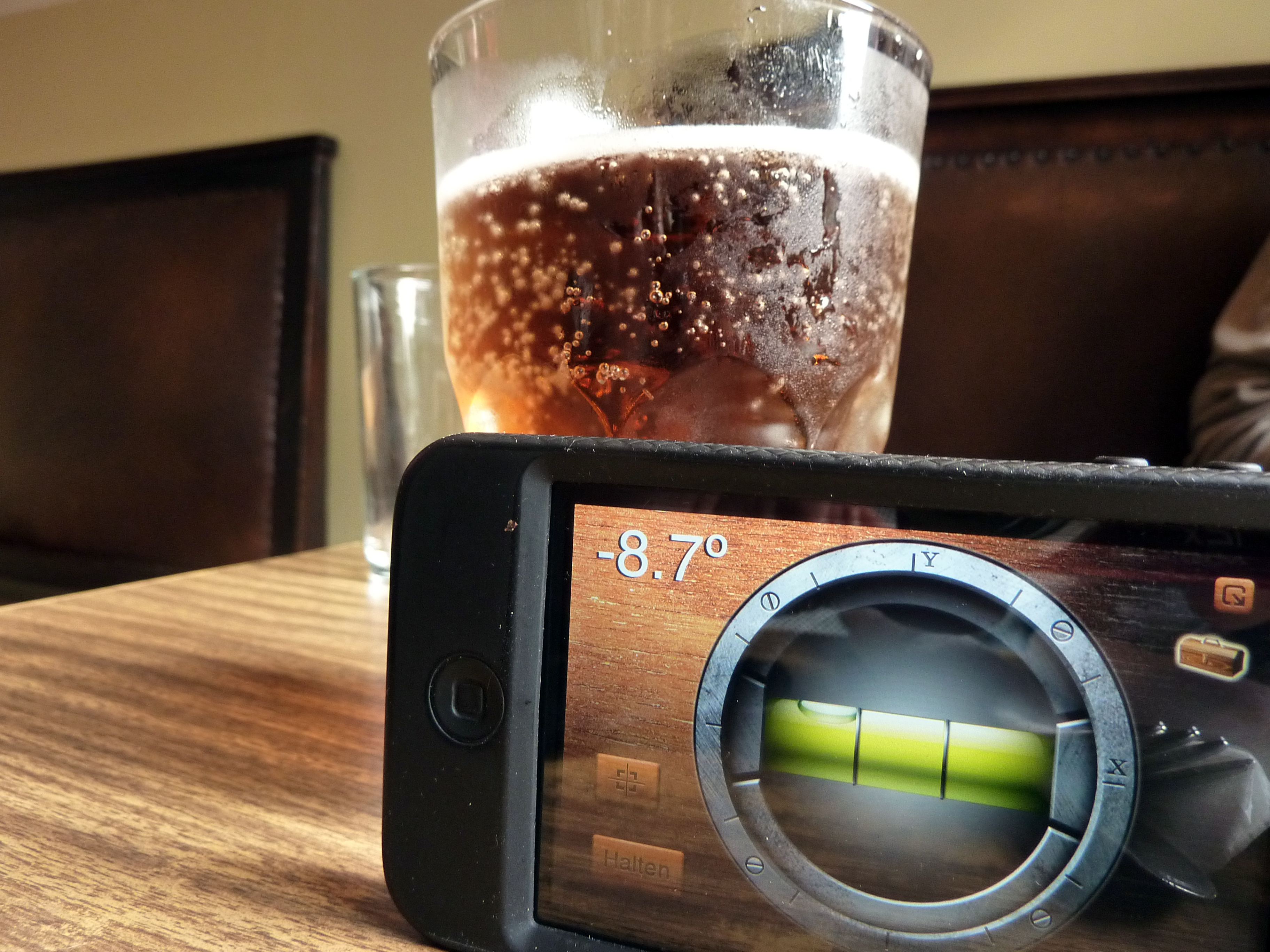 Oberhafenkantine 8,7 Grad Neigungswinkel